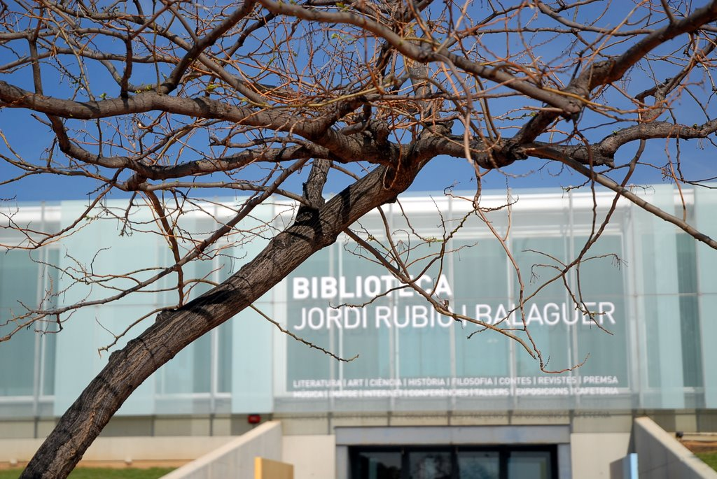 Espacio cultural y multimedia ubicado en el Parque de La Montanyeta de la Vila de Sant Boi de Llobregat. Fue inaugurada el 22 de mayo de 2005. Esta biblioteca tiene una superficie de 3.900 m² y es una de las más grandes de Cataluña.